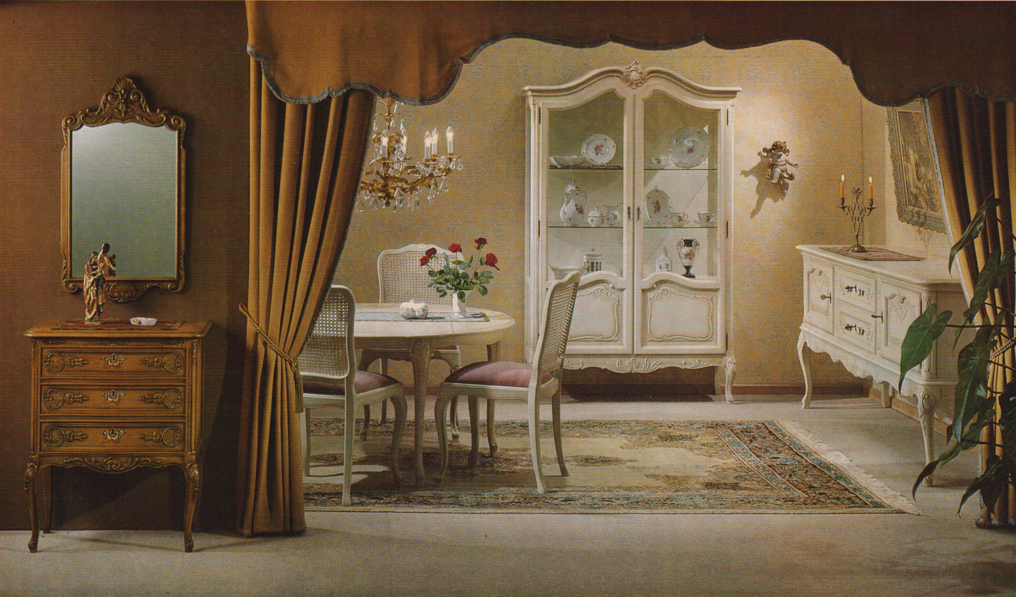 Katalogabbildung 1965, Speisezimmer in Schleiflack und Einzelmöbel in Eiche Beispiel 154: Vitrine „Nahl“, Sideboard „Verviers“, Esstisch „Dülken“, Stühle „Paris“ in Schleiflack, Kommode „Löwen“, Spiegel „Maas“ in Eiche, alles in Aachen-Lütticher Barock